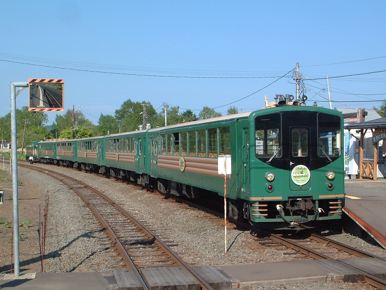 JR北海道塘路駅で停車中の『釧路湿原ノロッコ号』